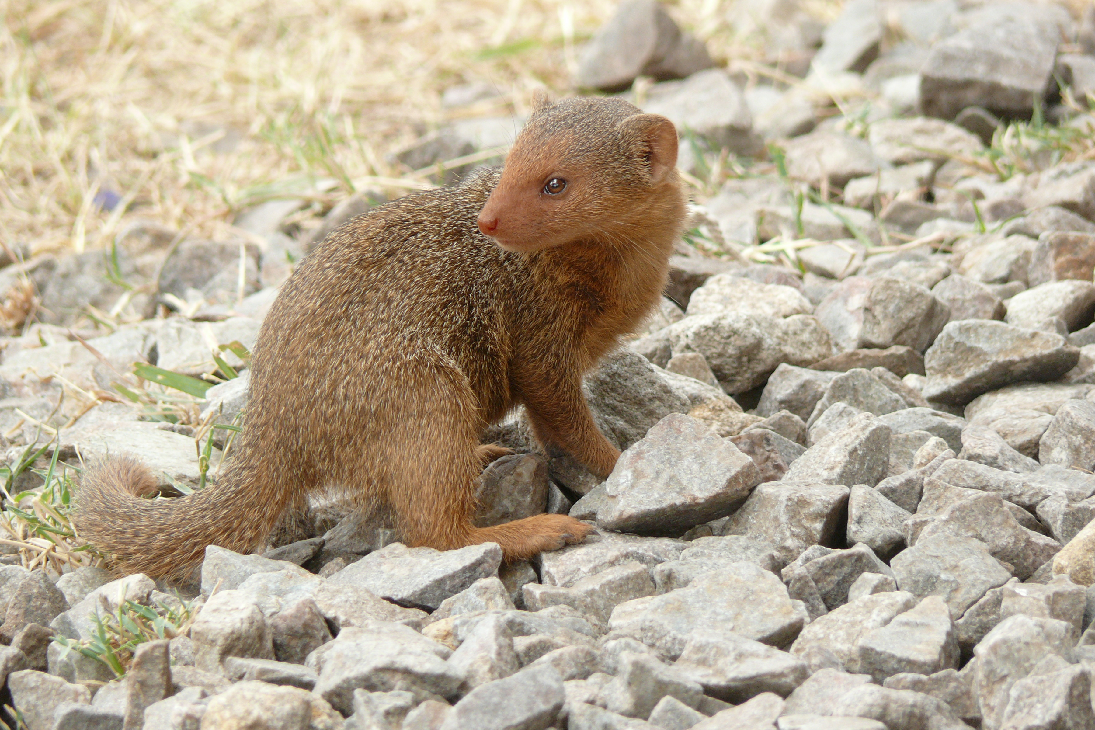 Südliche Zwergmanguste (Helogale parvula)